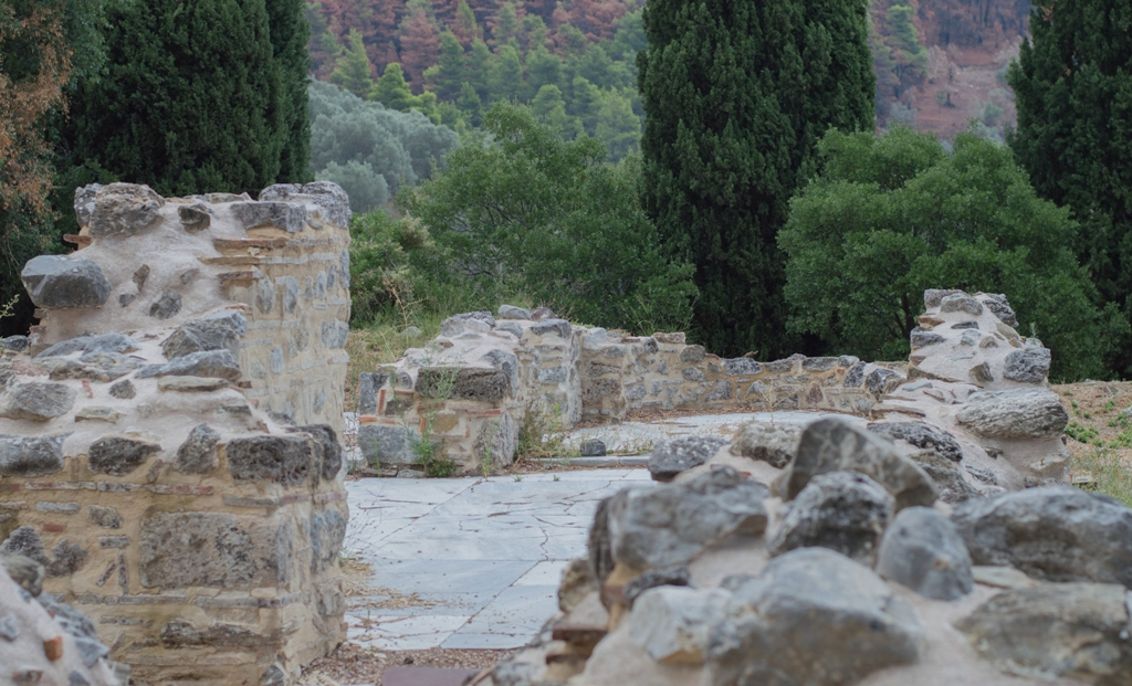 Μοναστήρι Αγ.Νικολάου